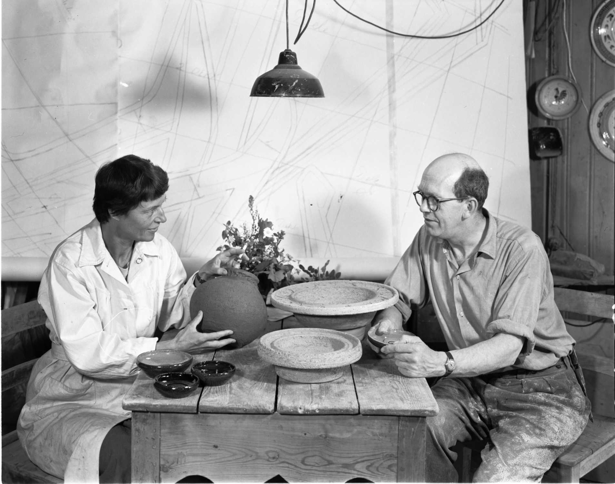 Det norske keramikerekteparet Jens von der Lippe (1911-1990) og Margrethe von der Lippe (f. Lund) (1913-99)